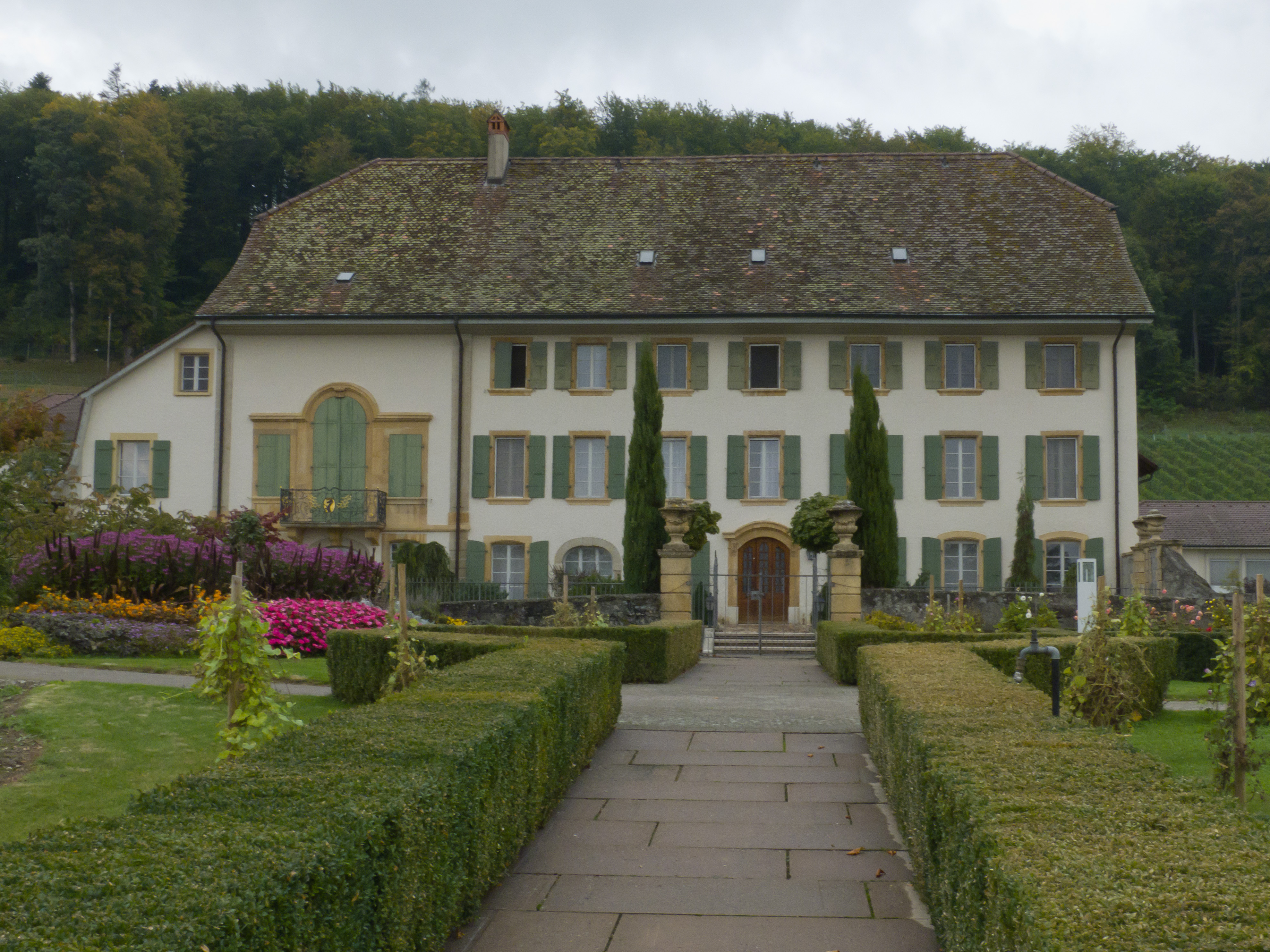 Ehemalige Campagne von Steiger, jetzt Klinik Bethesda. Südfassade